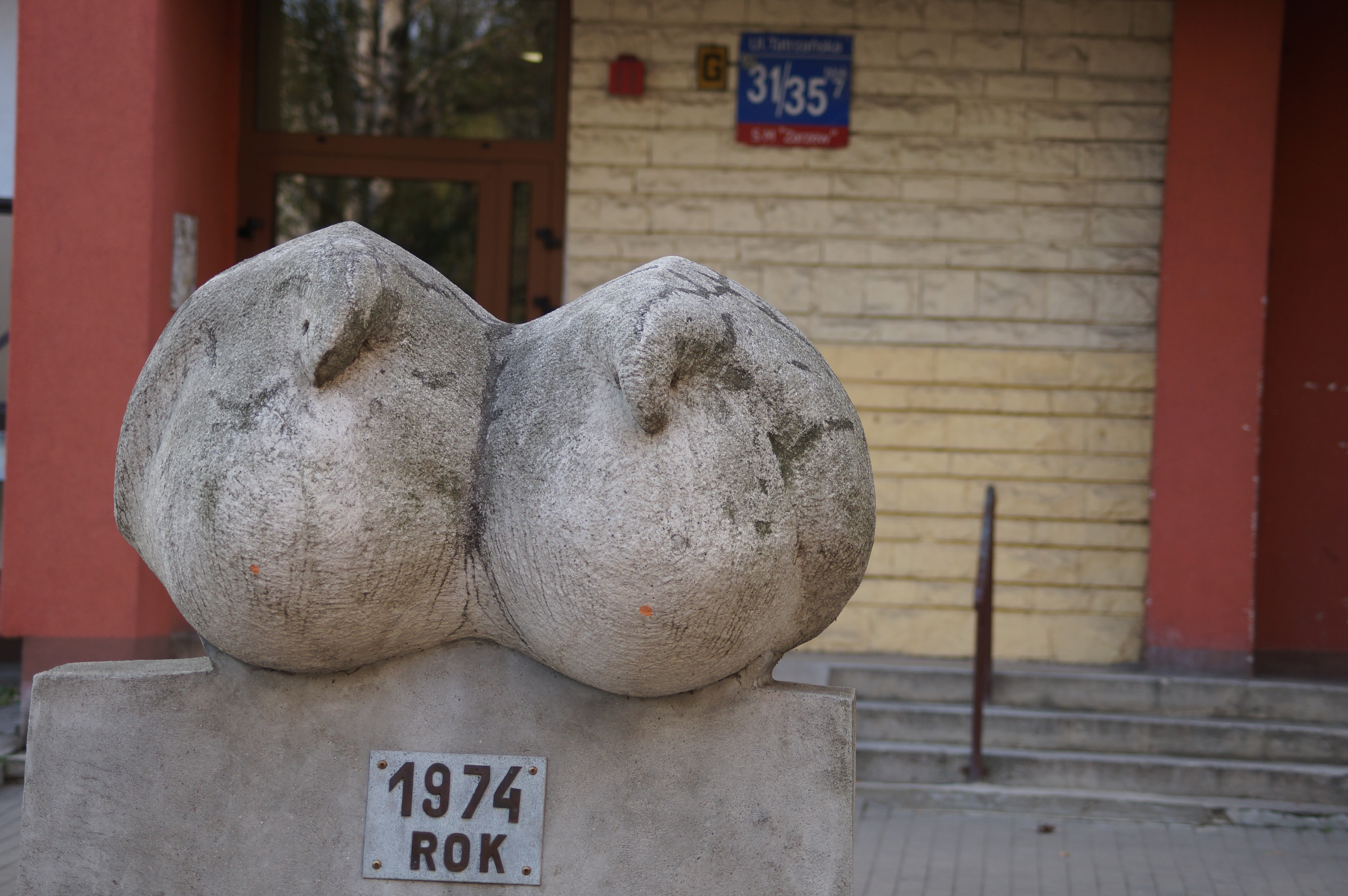 Synogarlice rzeźba Michała Gałkiewicza